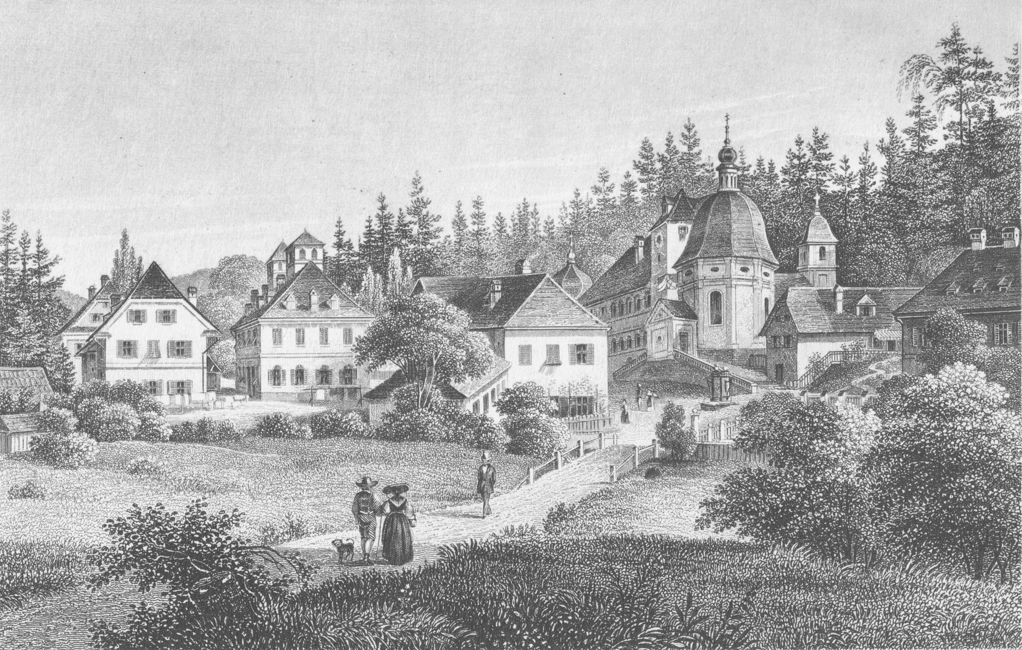 Tobelbad.